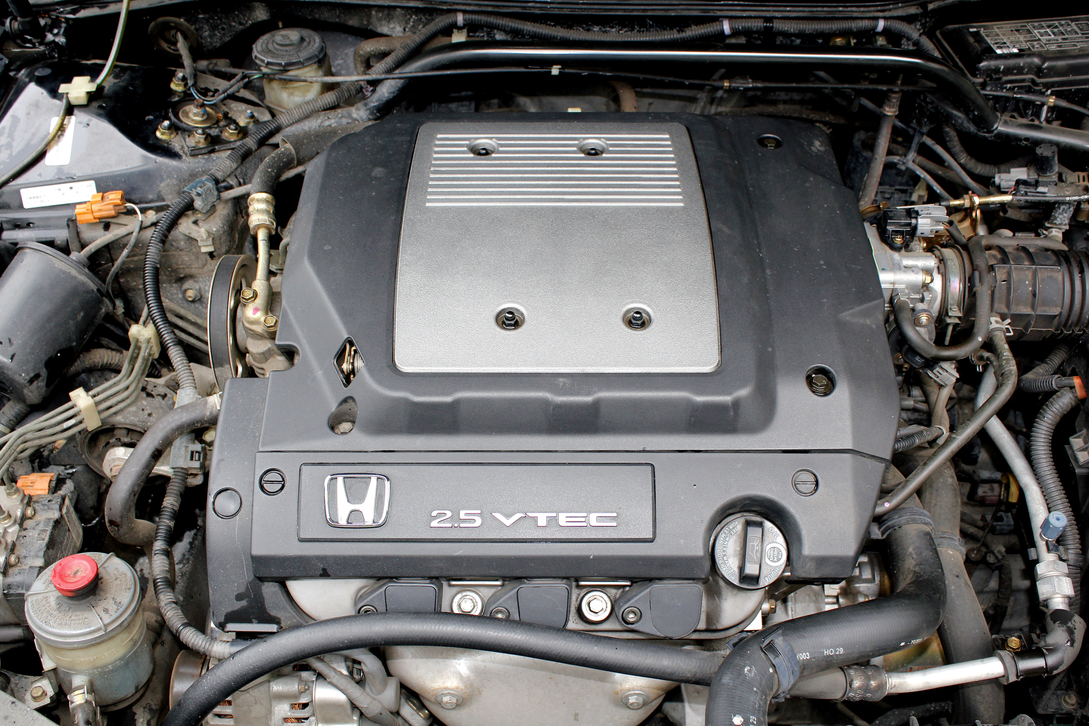 ホンダJ25Aエンジン（ホンダオブアメリカGF-UA4《インスパイア25V》）